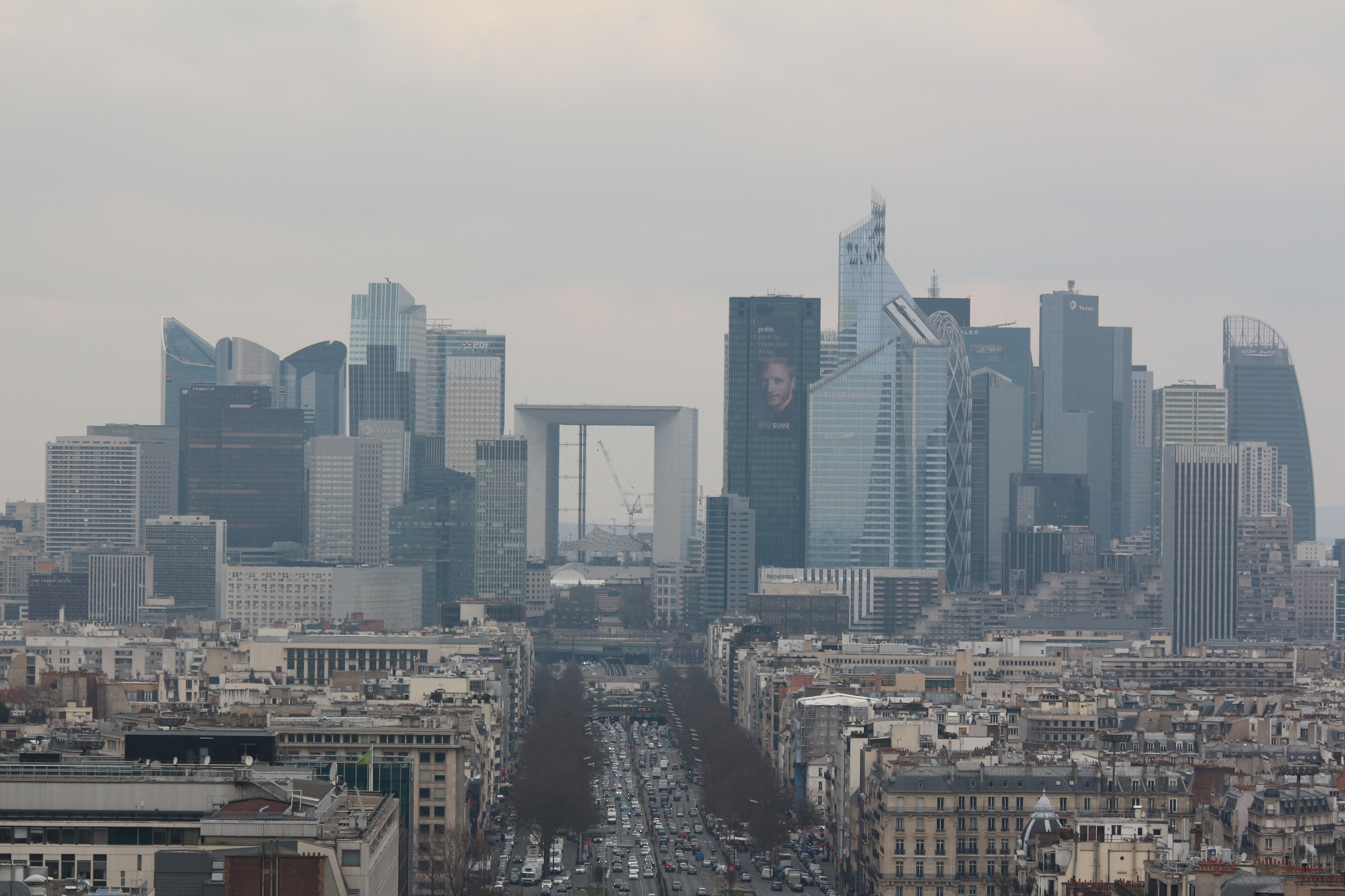 Blick vom Arc de Triomphe de l’Étoile auf La Défense im März 2015